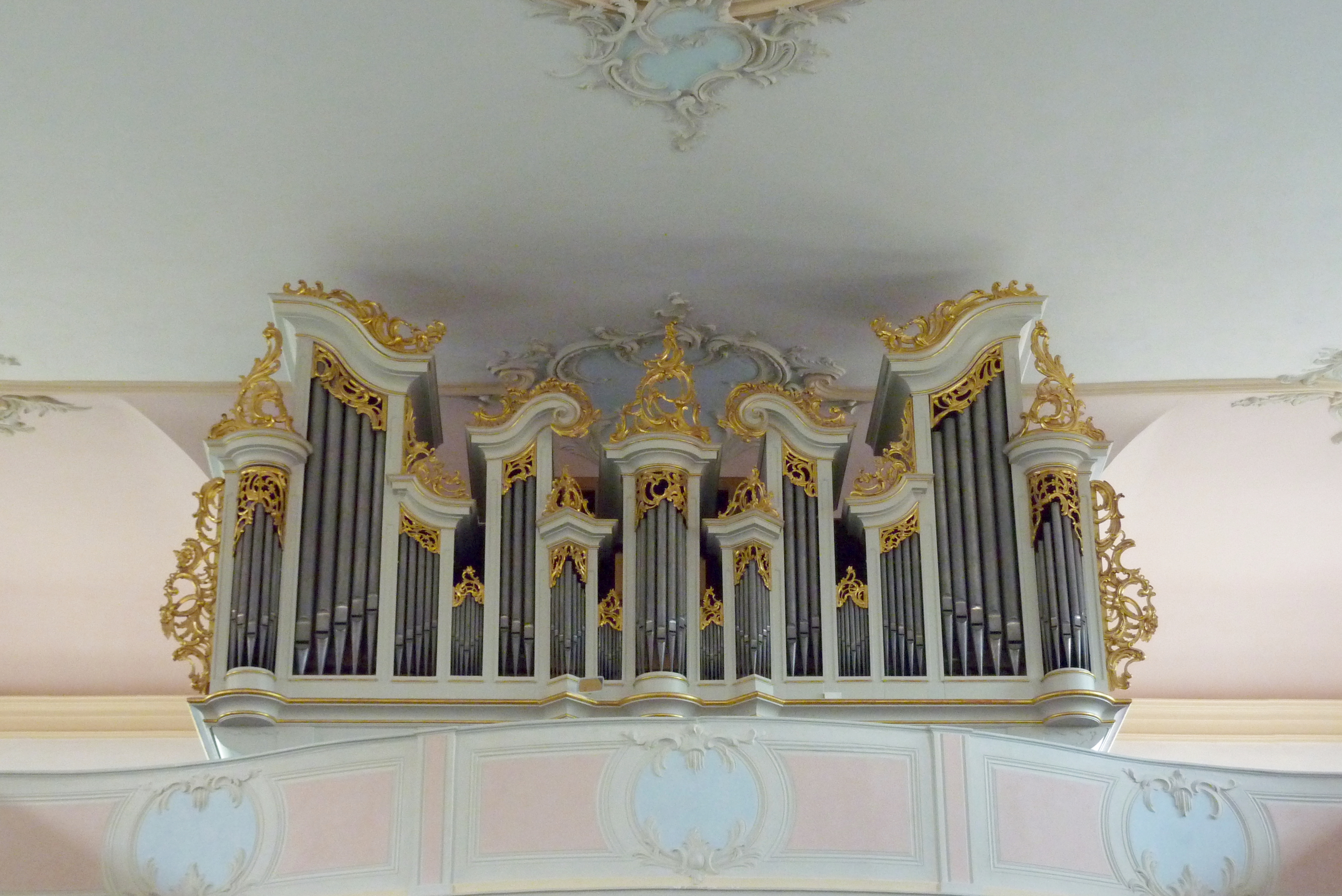 Evangelische Stadtkirche in Lauterbach (Hessen), Marktplatz 10, Orgel